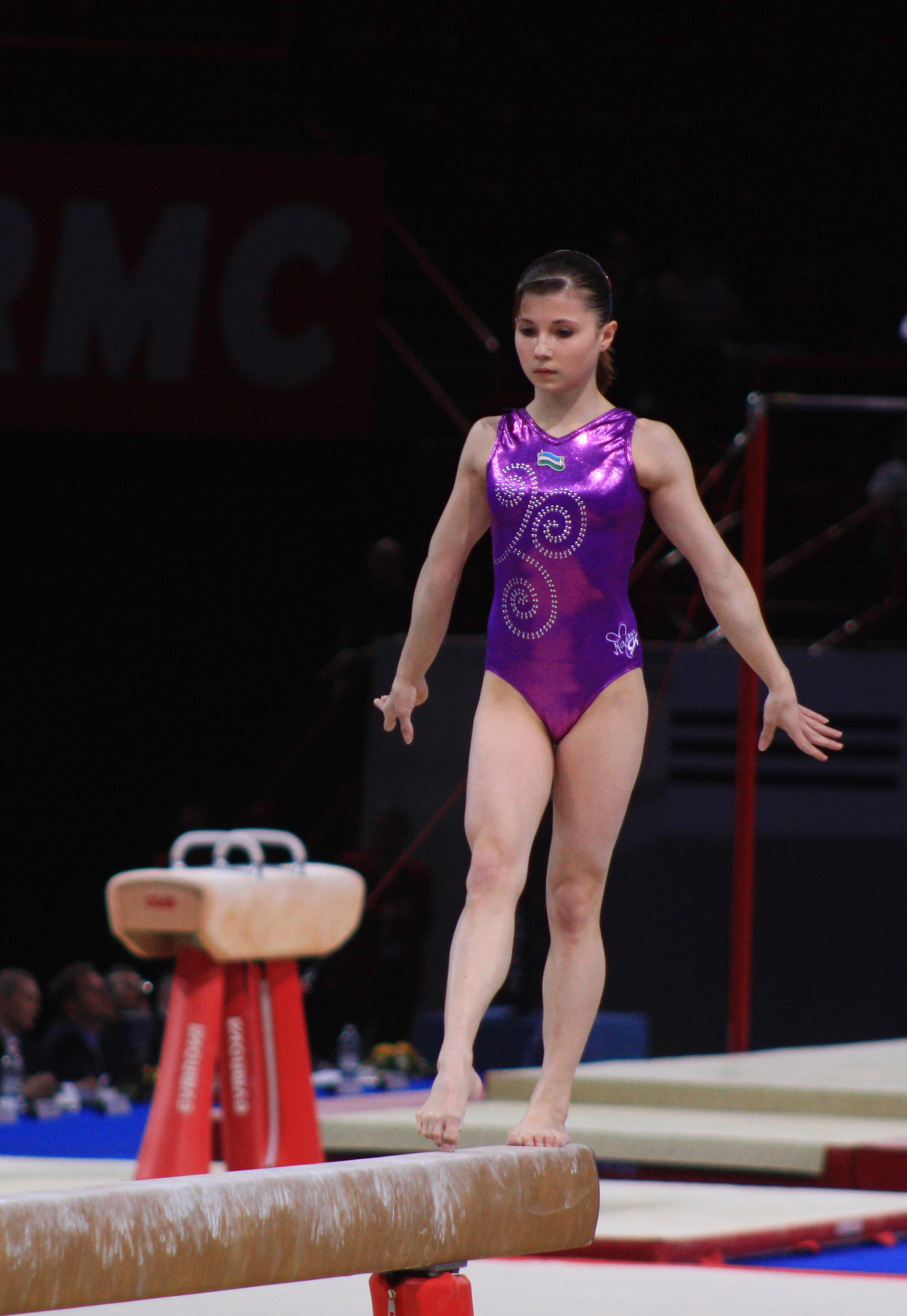 Luisa Galiulina lors des qualifications de la poutre aux 17e Internationaux de France en 2010.